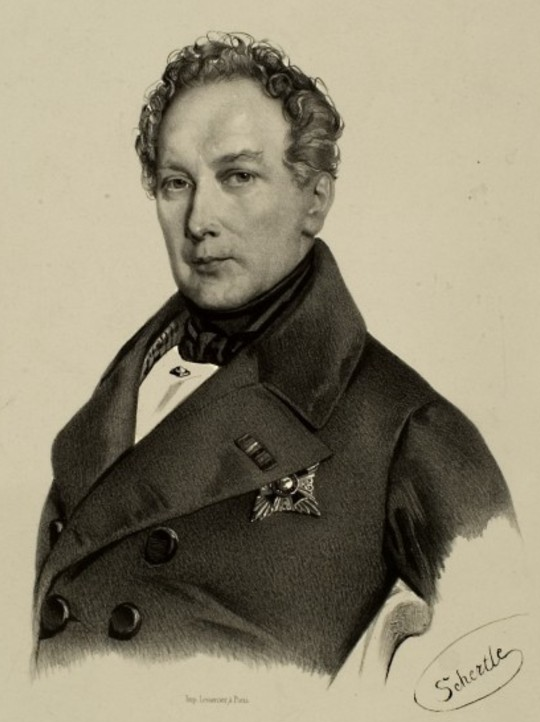 Depicted person: Maximilian Joseph von Chelius, 1818–1864 Professor für Chirurgie und Augenheilkunde in Heidelberg